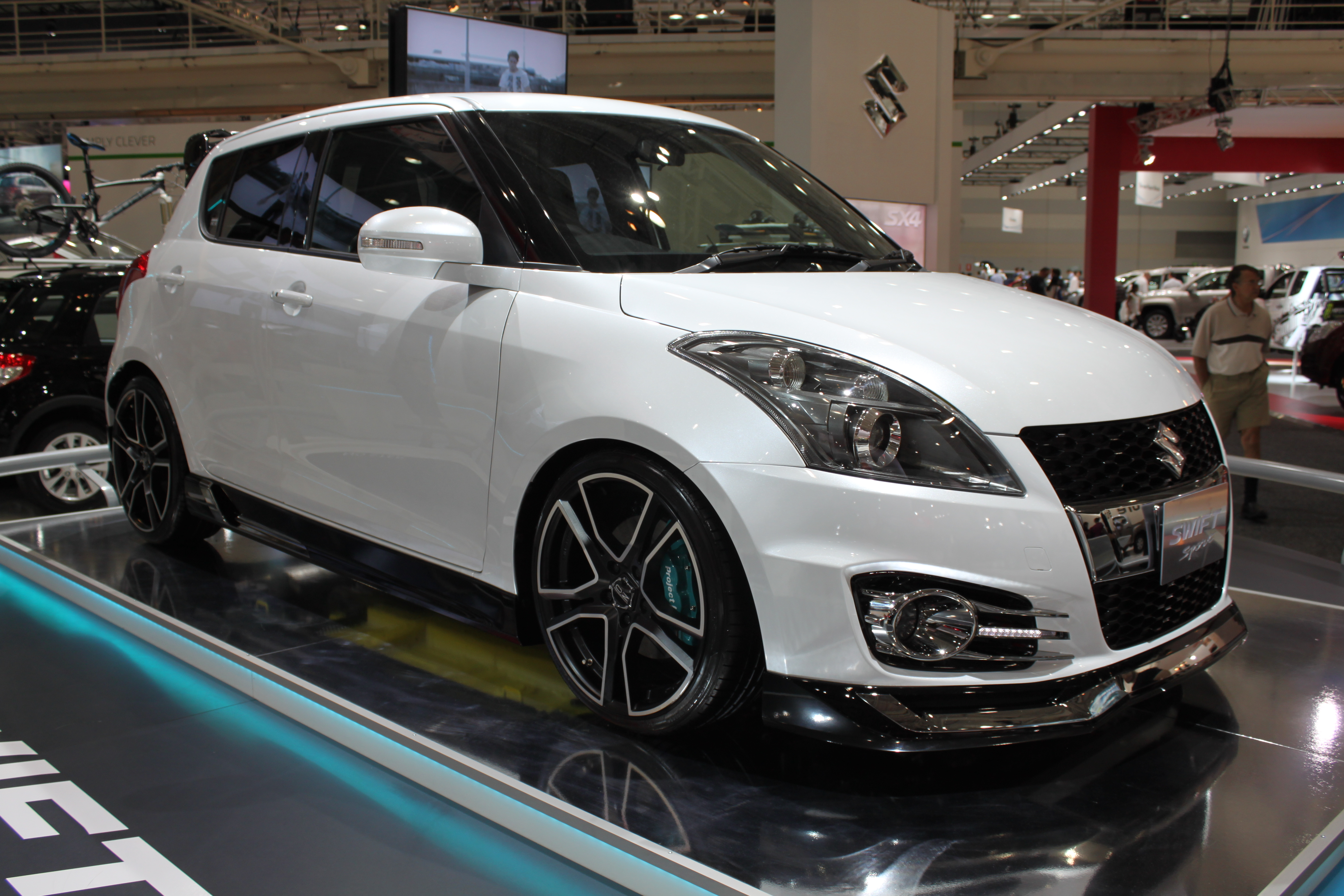 Suzuki Swift Sport